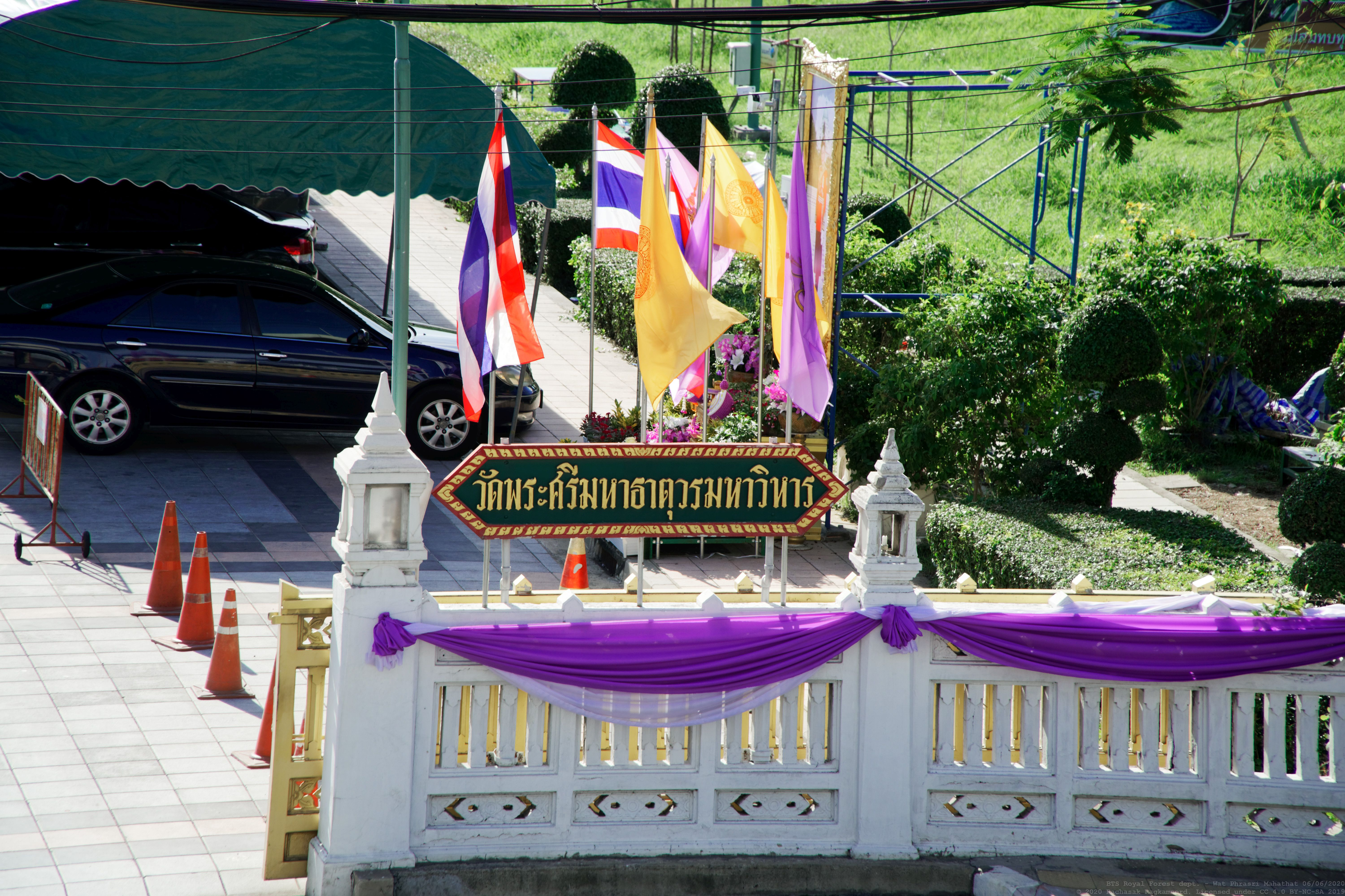 ป้ายวัดพระศรีมหาธาตุ